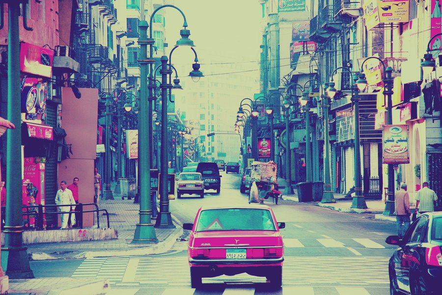 Alexandria, Egypt